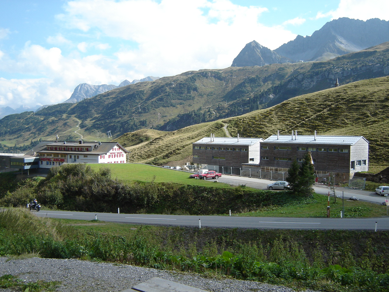 Das Hotel Adler am Hochtannbergpass